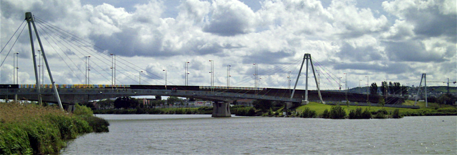 D'Meurthe bei Nanzeg.